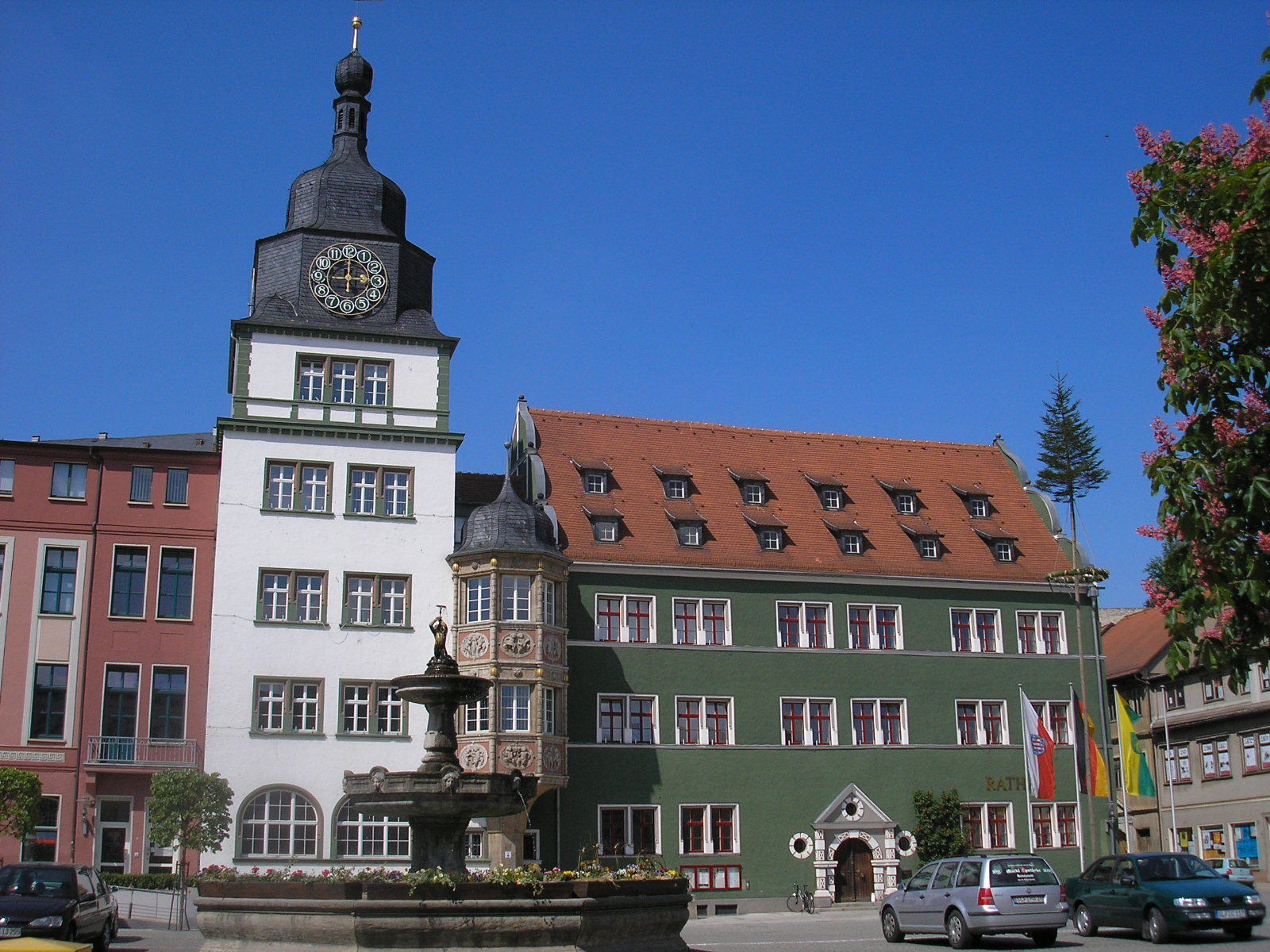 Das Rathaus in Rudolstadt (Thüringen)